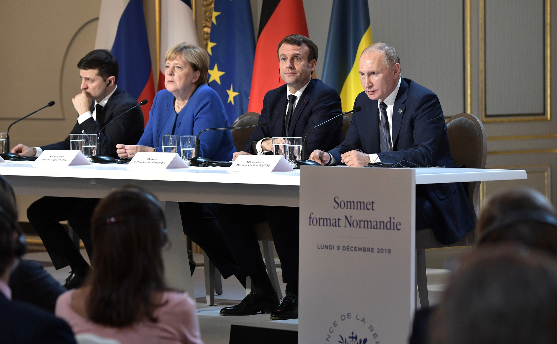 Совместная пресс-конференция по итогам встречи в «нормандском формате»